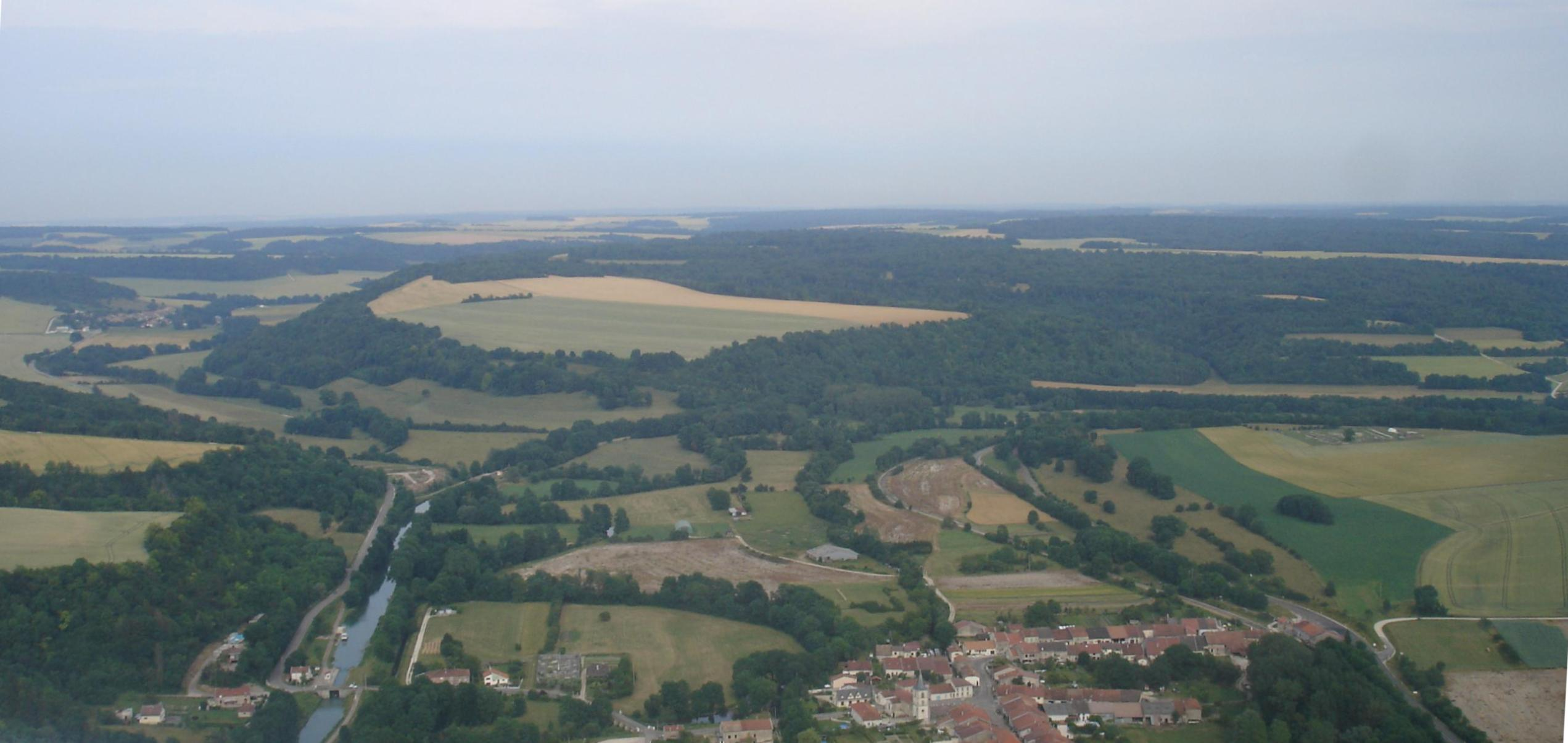 L'oppidum de Boviolles d'une superficie de 50 hectares domine la confluence Ornain-Barboure, lieu d'implantation de l'agglomération antique de Nasium.